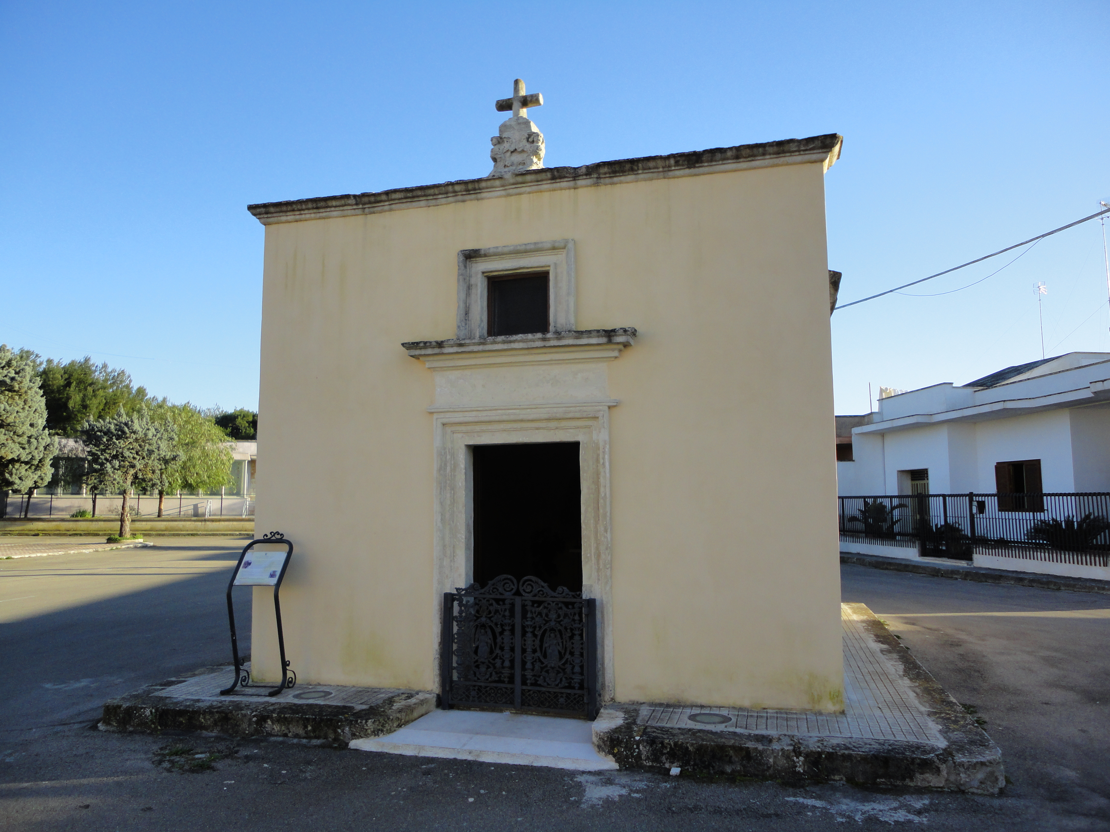 Edicola Madonna delle Grazie Martignano, Lecce